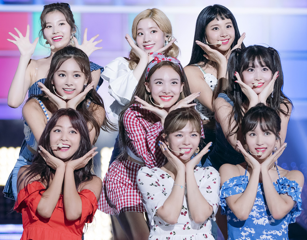 180717 열린음악회 트와이스